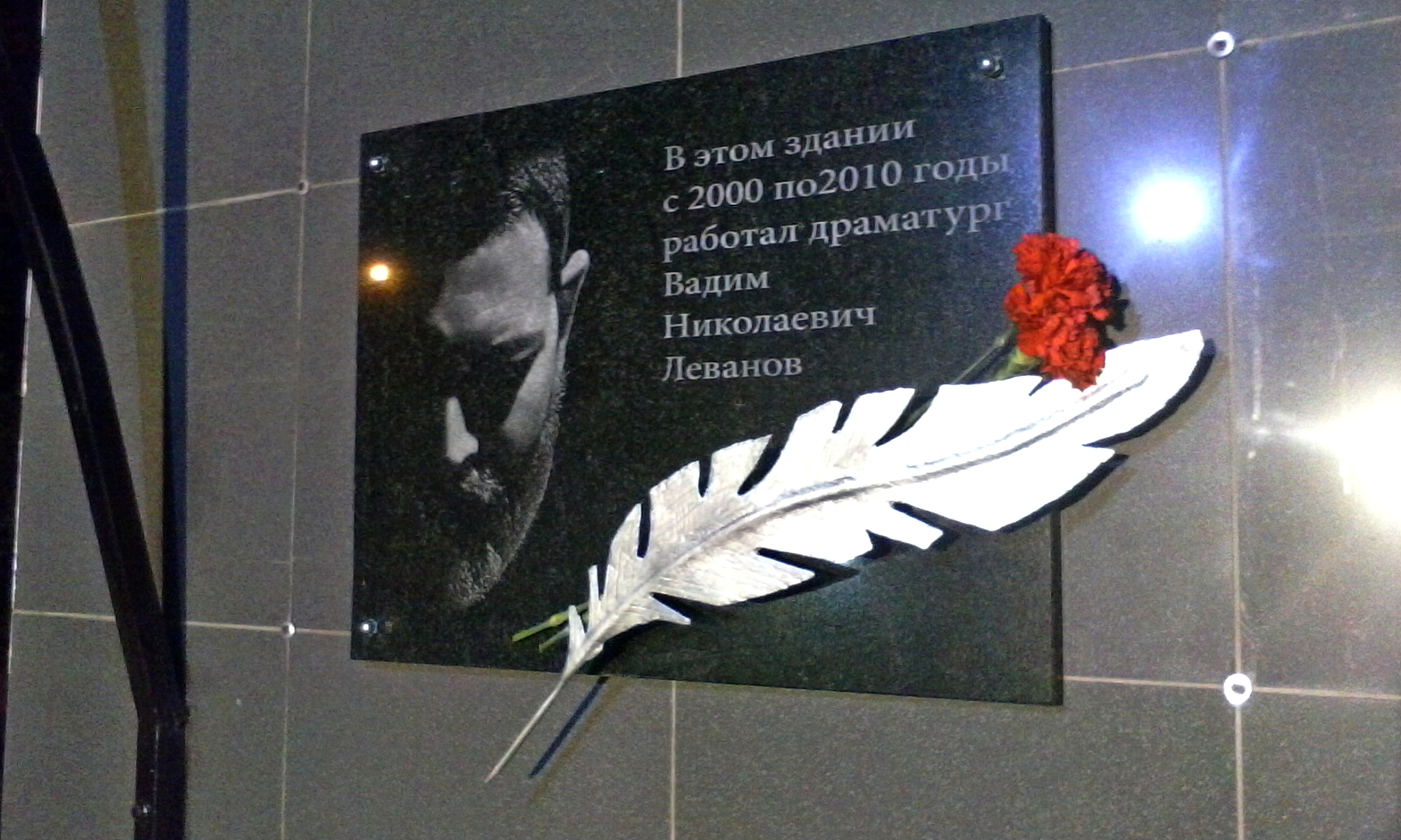 Мемориальная доска Вадиму Леванову. Молодёжный драматический театр. Тольятти. Россия